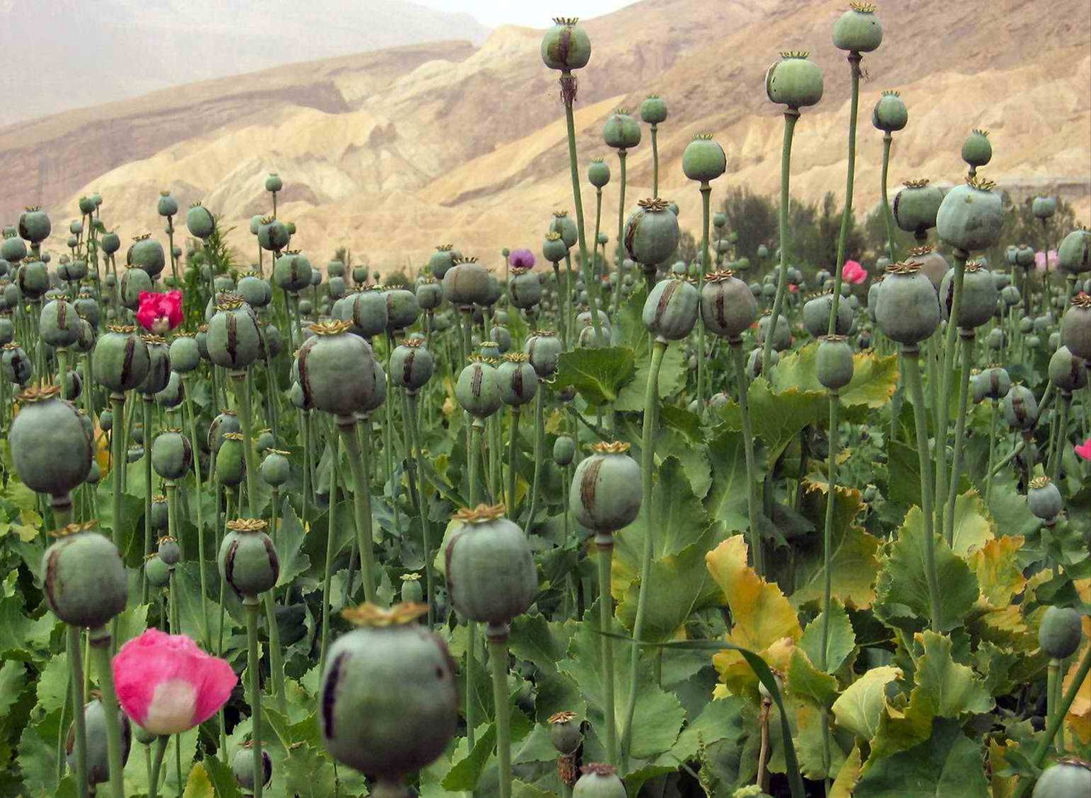 pavot